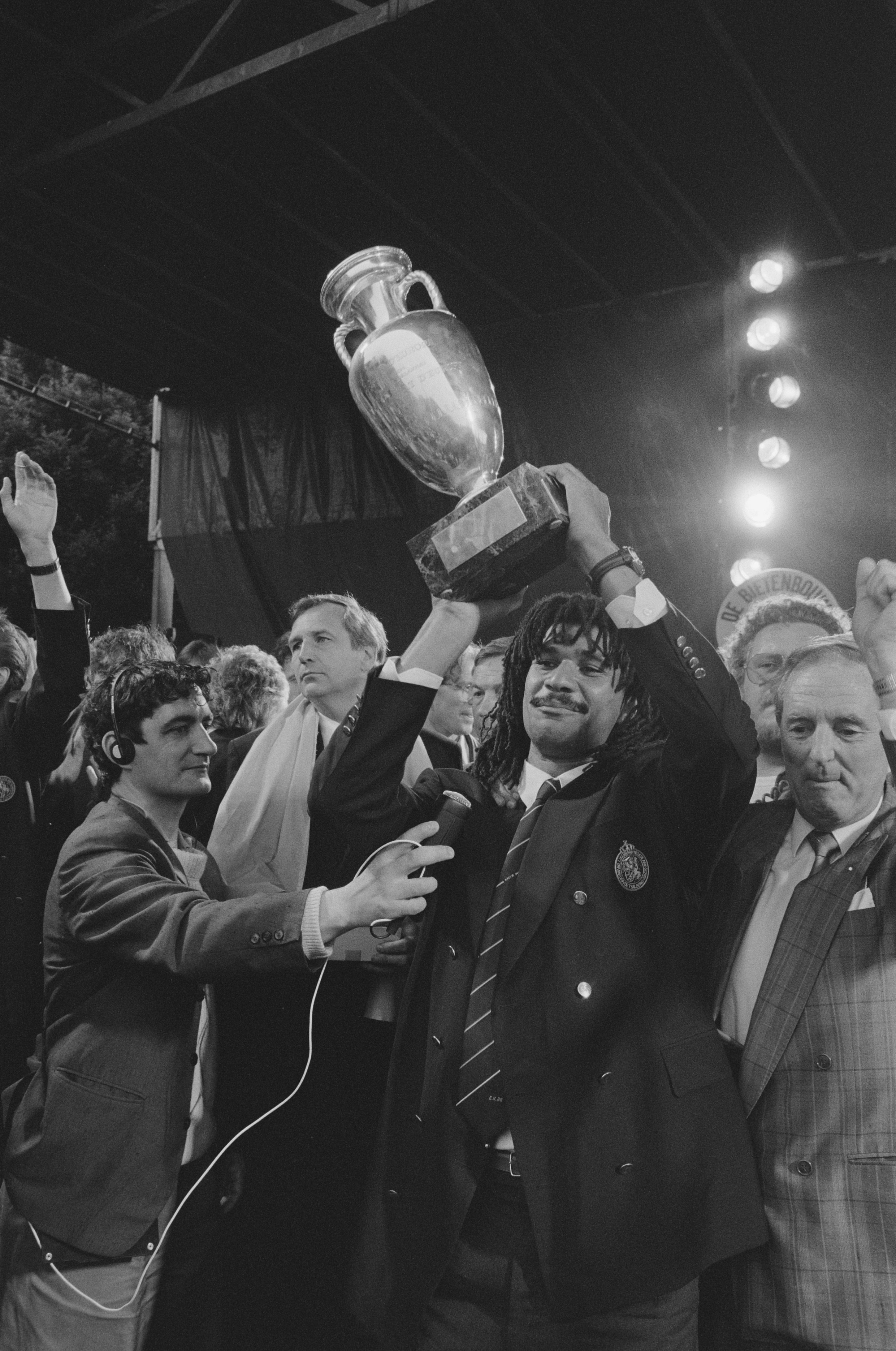 Collectie / Archief : Fotocollectie Anefo Reportage / Serie : [ onbekend ] Beschrijving : Huldiging Nederlands elftal na Europees kampioenschap 1988 te Munchen in Amsterdam; Ruud Gullit met beker Datum : 26 juni 1988 Locatie : Amsterdam, Noord-Holland Trefwoorden : sport, voetbal Persoonsnaam : Gullit, Ruud Fotograaf : Croes, Rob C. / Anefo Auteursrechthebbende : Nationaal Archief Materiaalsoort : Negatief (zwart/wit) Nummer archiefinventaris : bekijk toegang 2.24.01.05 Bestanddeelnummer : 934-2755